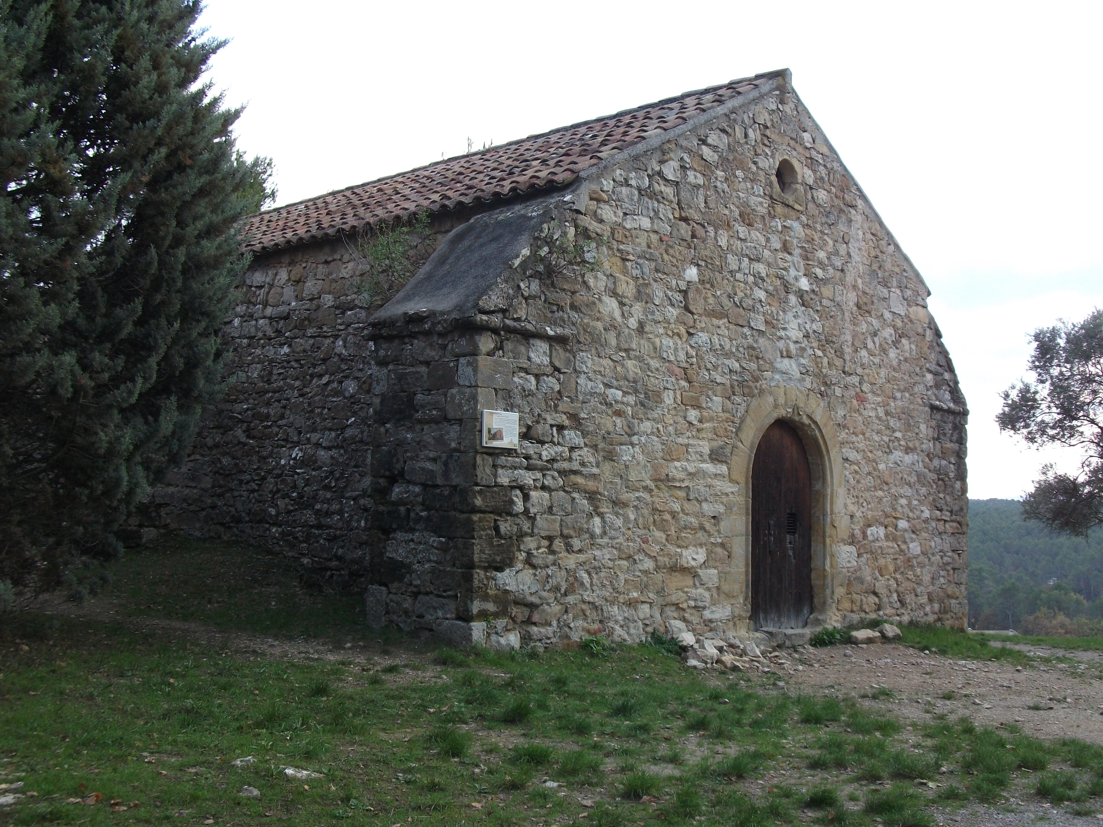 Chapelle Saint-Michel, Fuveau, Bouches-du-Rhône, France